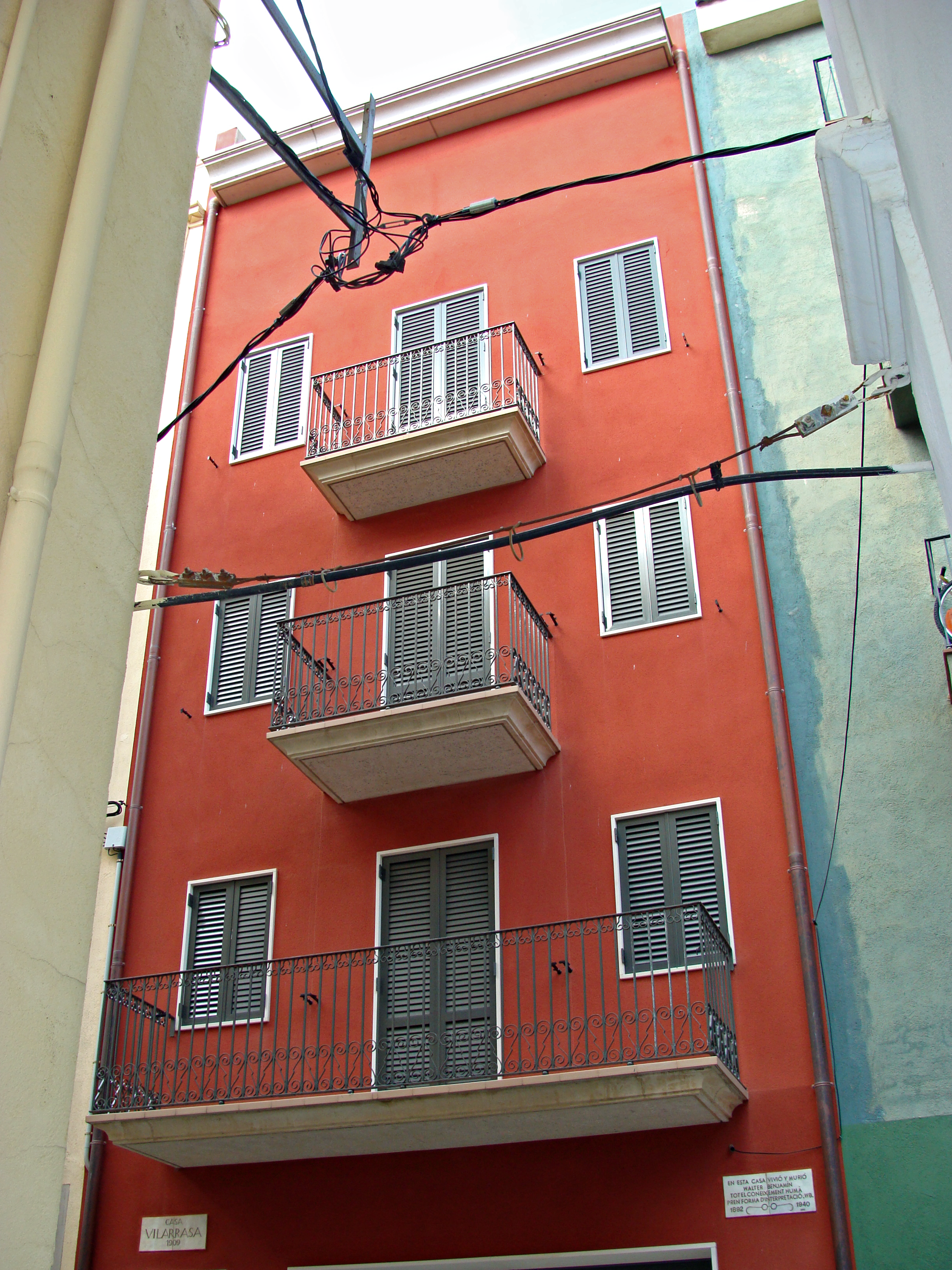 Spanien: Sterbehaus Walter Benjamins in Portbou.